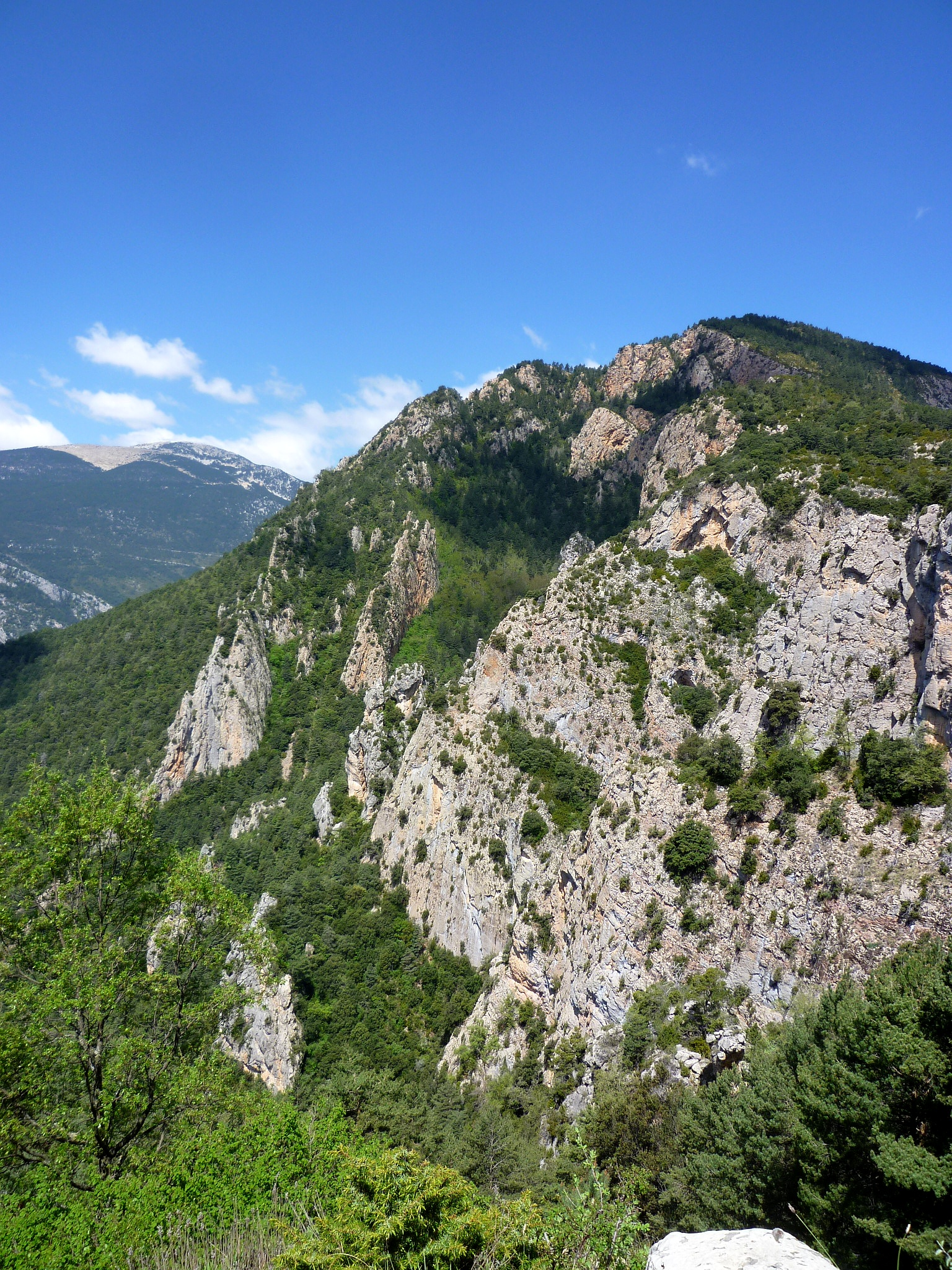 Les Costes de Rebalç des del camí a la Borda del Pujol. La Coma i la Pedra (Solsonès - Catalunya)